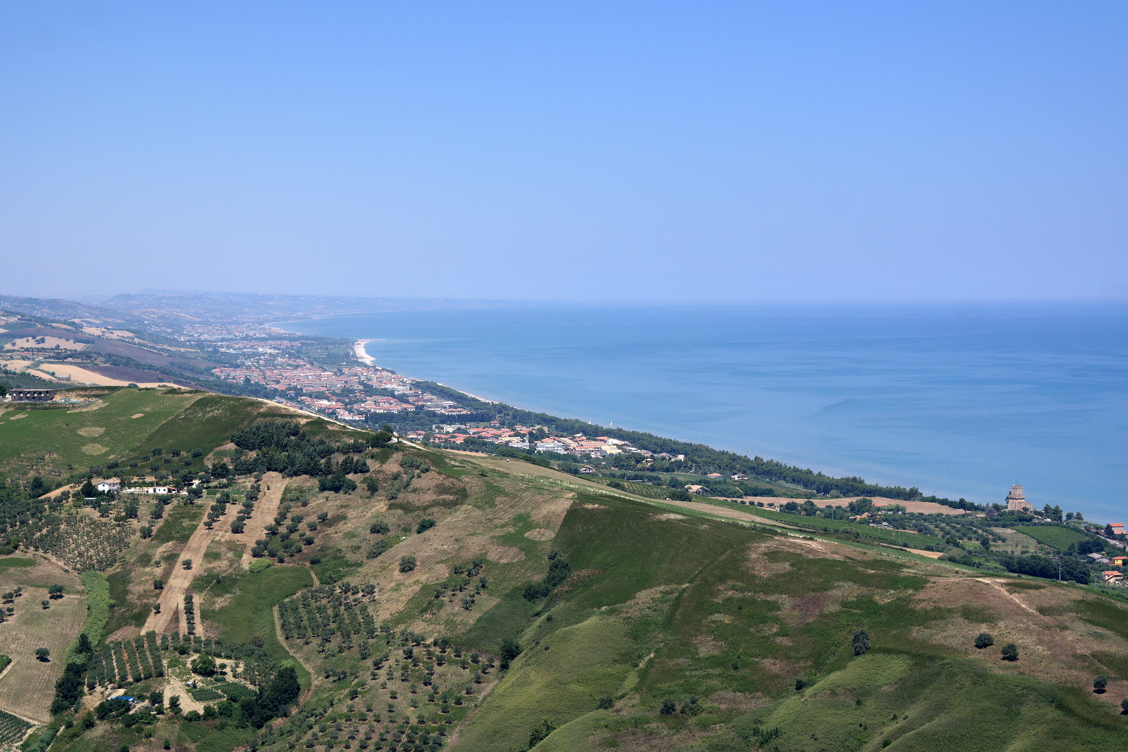 Panorama della costa teramana dal belvedere di Silvi Paese. In basso a destra la Torre di Cerrano